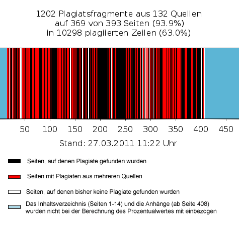 grafische Darstellung der Plagiate in der Dissertation Guttenberg